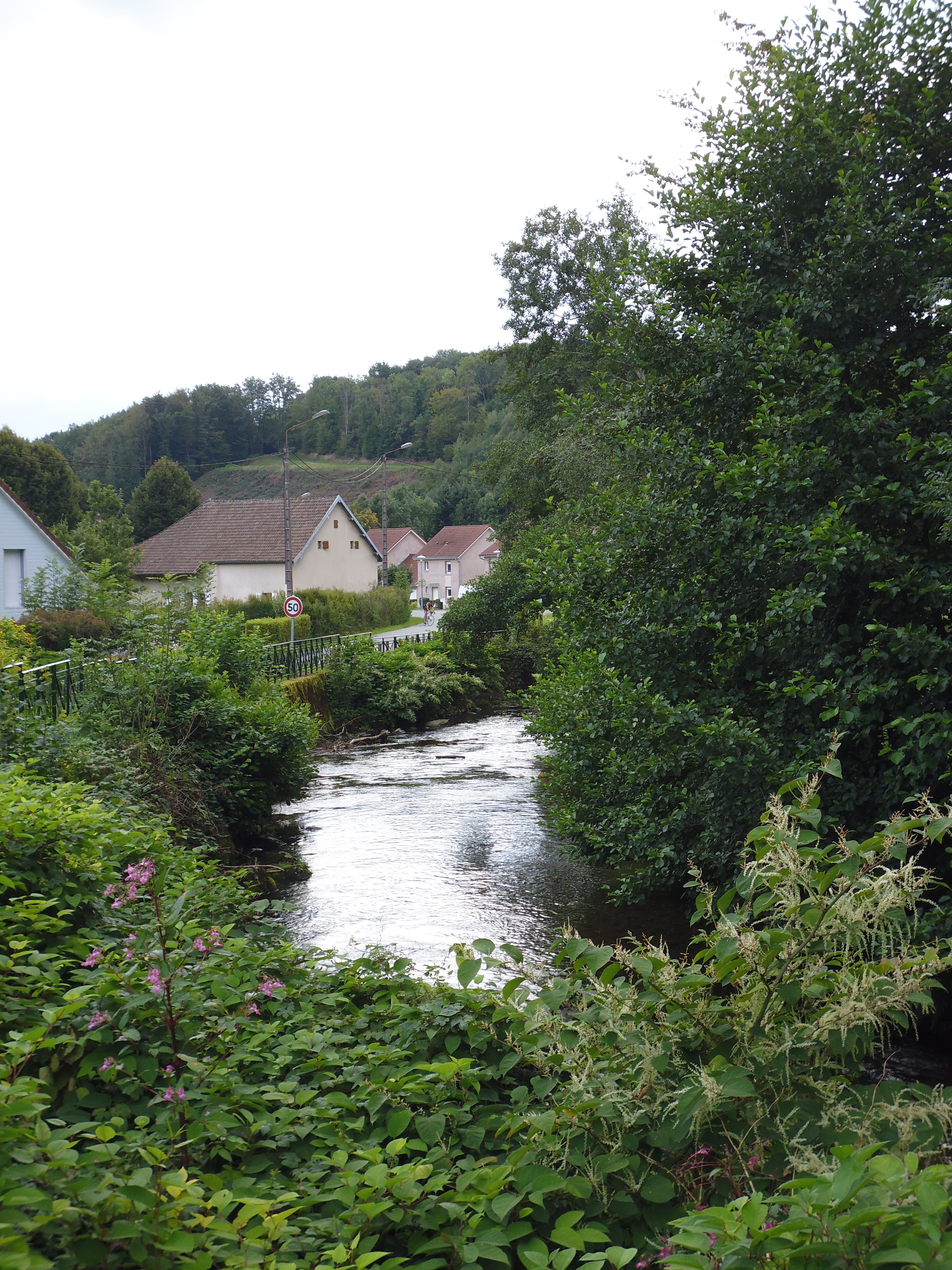 Vue du Rahin à Plancher-Bas (angle rue Général-Brosset / rue du 19 mars 1962).